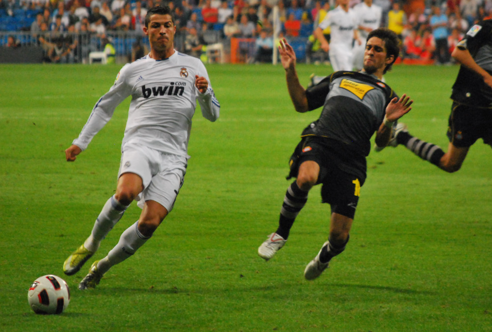 A punto de coger a Cristiano Ronaldo